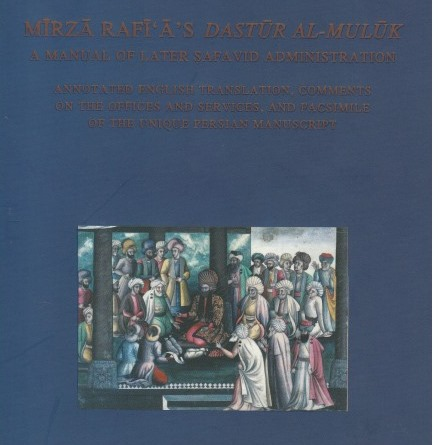 Dastur al-Muluk, first English translation by Marcinkowski